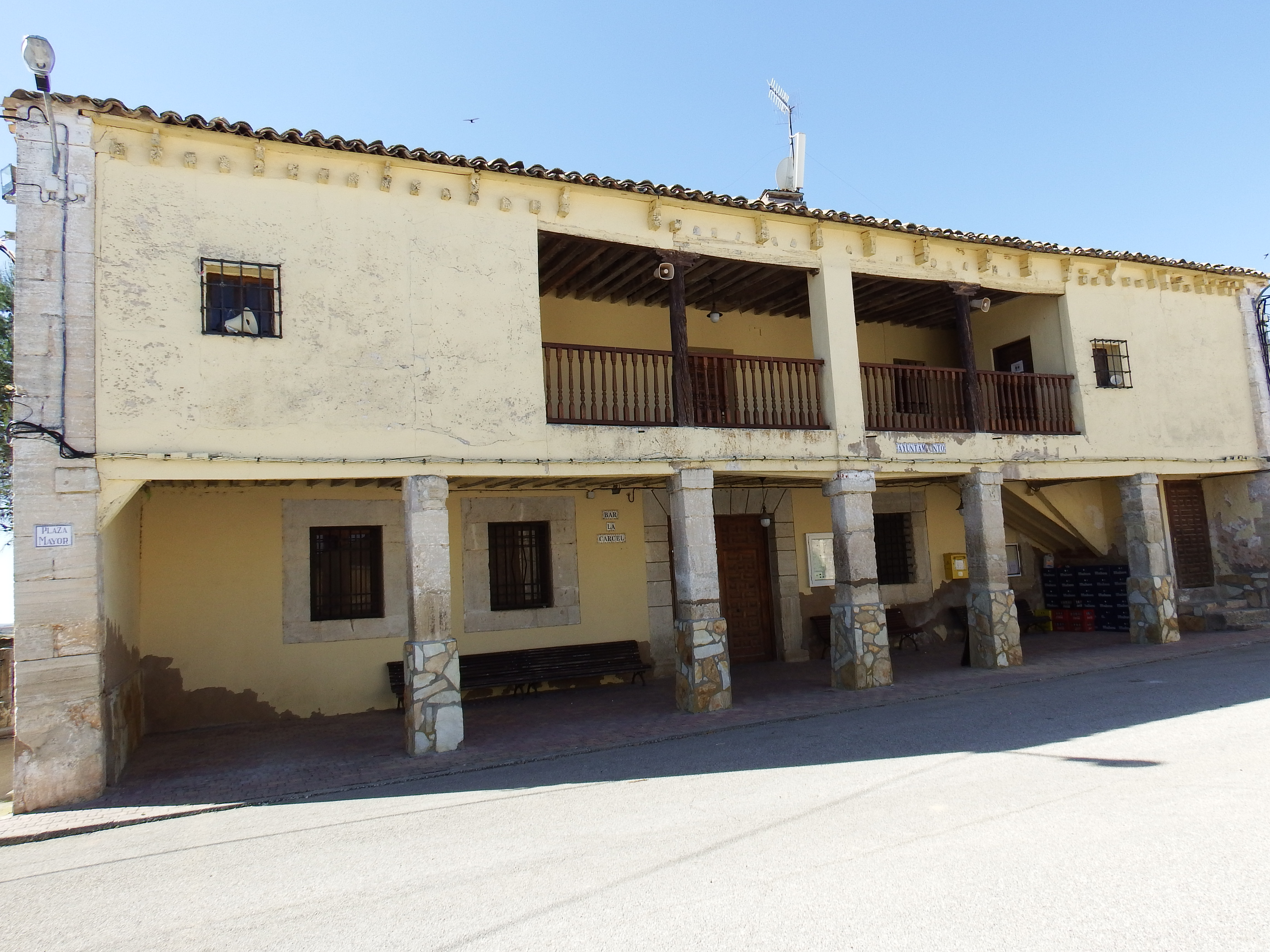 La Parra de las Vegas. Ayuntamiento.